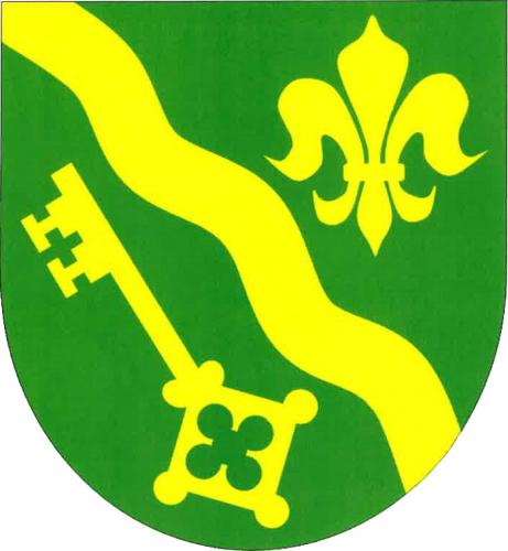 znak, Nový Jimramov, okres Žďár nad Sázavou